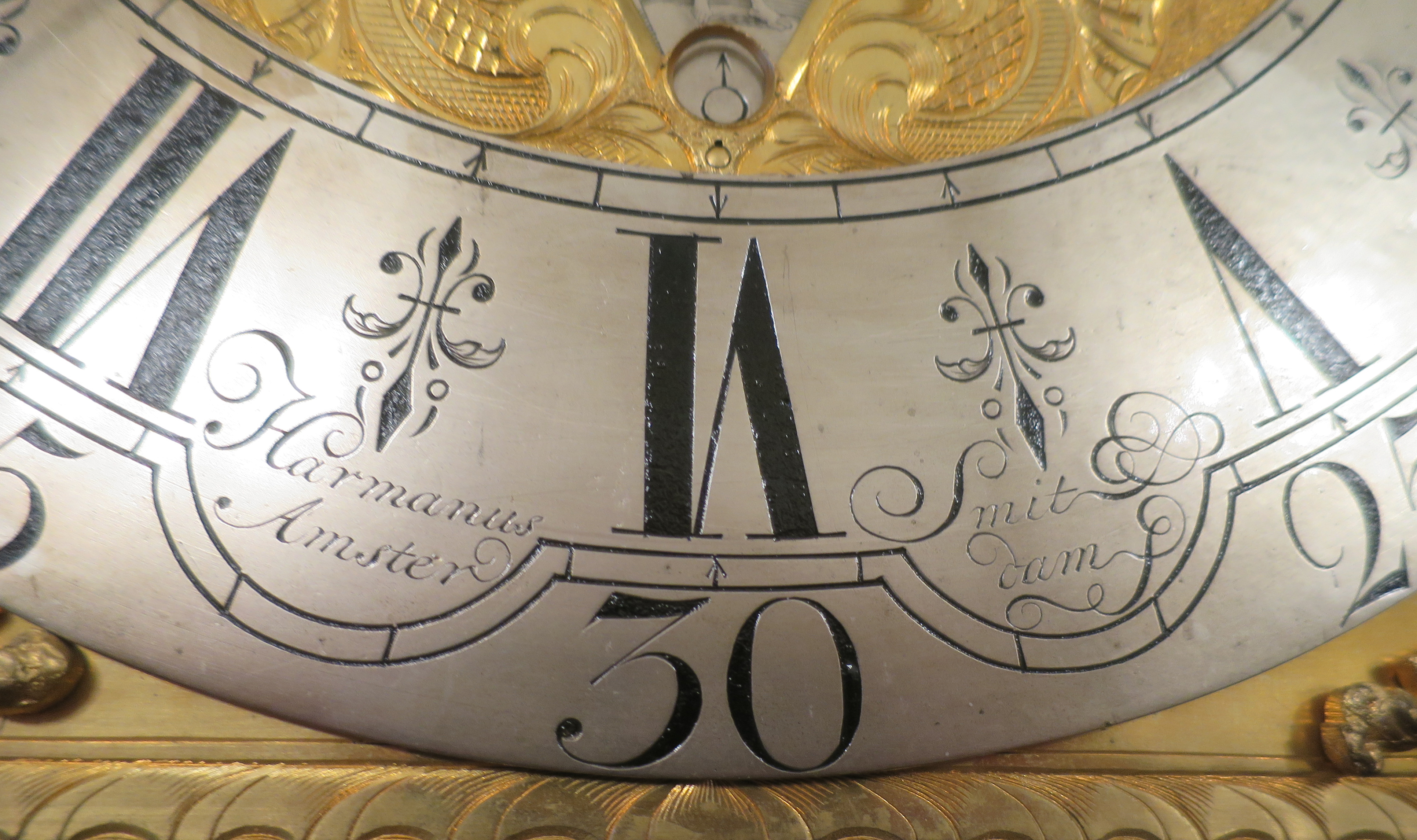 Signatur des Uhrmachers Hermanus (Harmanus) Smit, Amsterdam